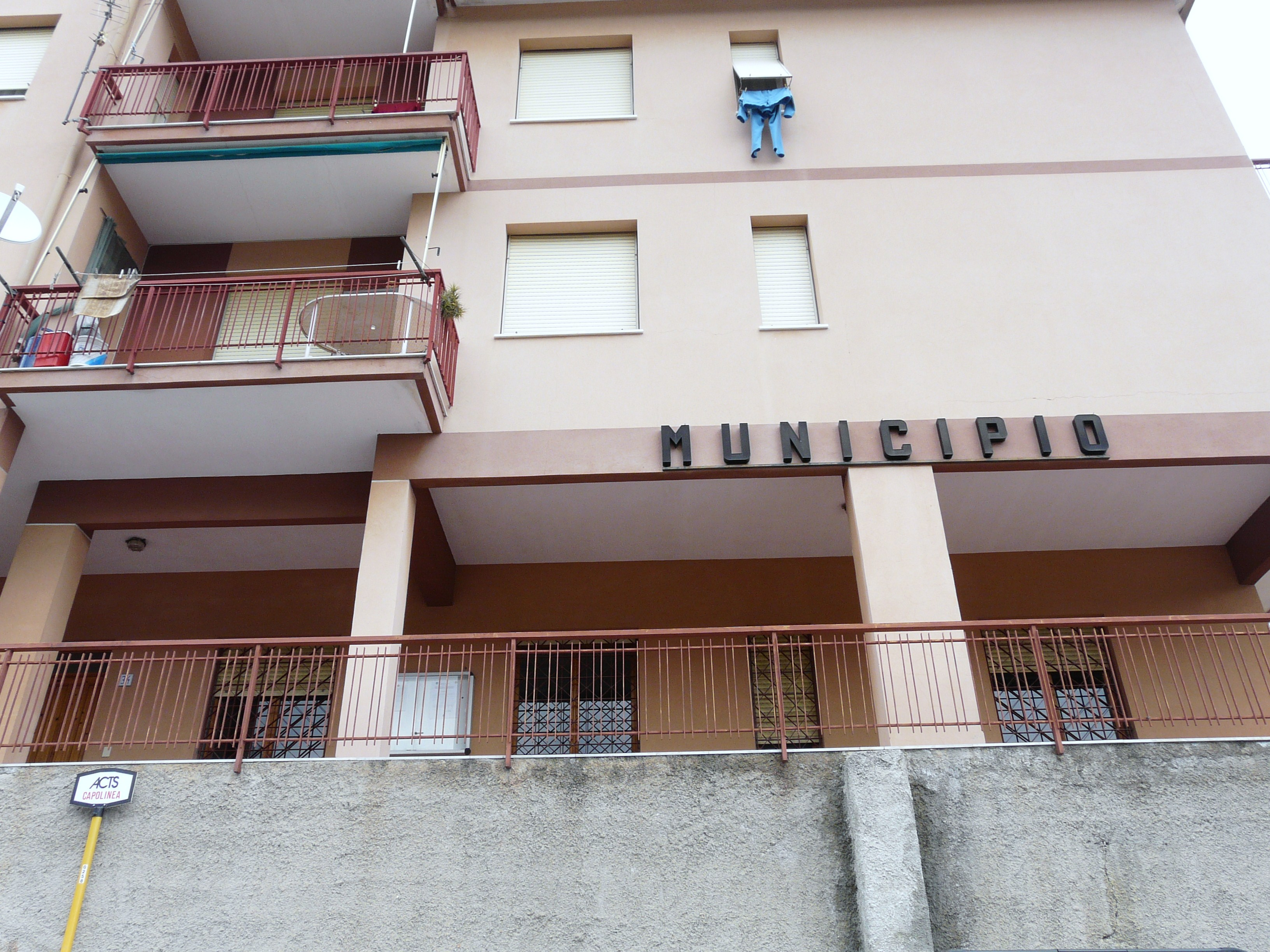 Municipio, Rialto, Liguria, Italia